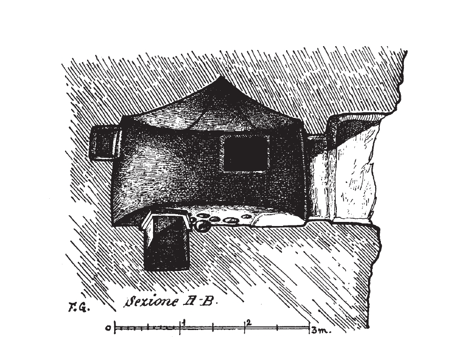 Disegno di Francesco Giarrizzo